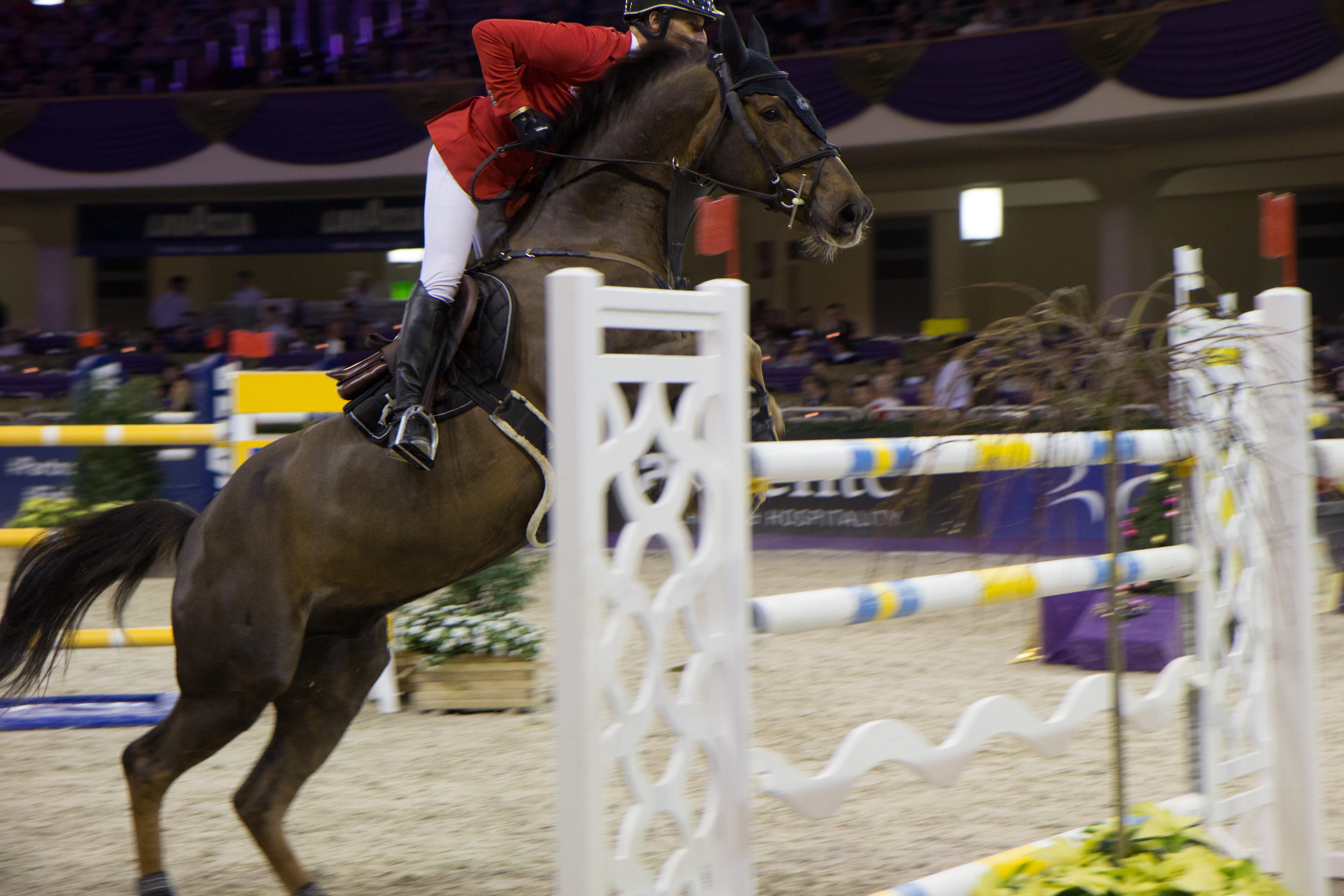 Internationales Festhallen Reitturnier 2017 in Frankfurt.Pius Schwizer auf Cortney Cox